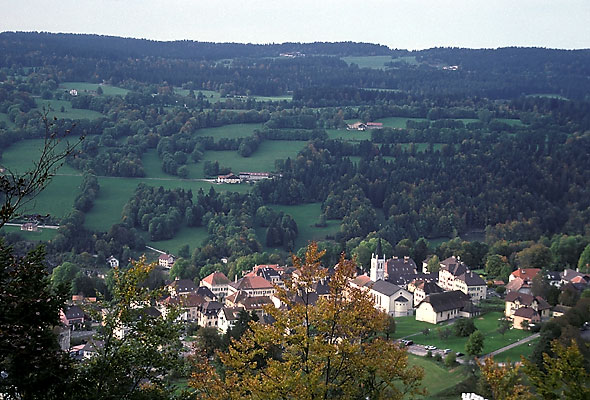 Blick auf Les Brenets